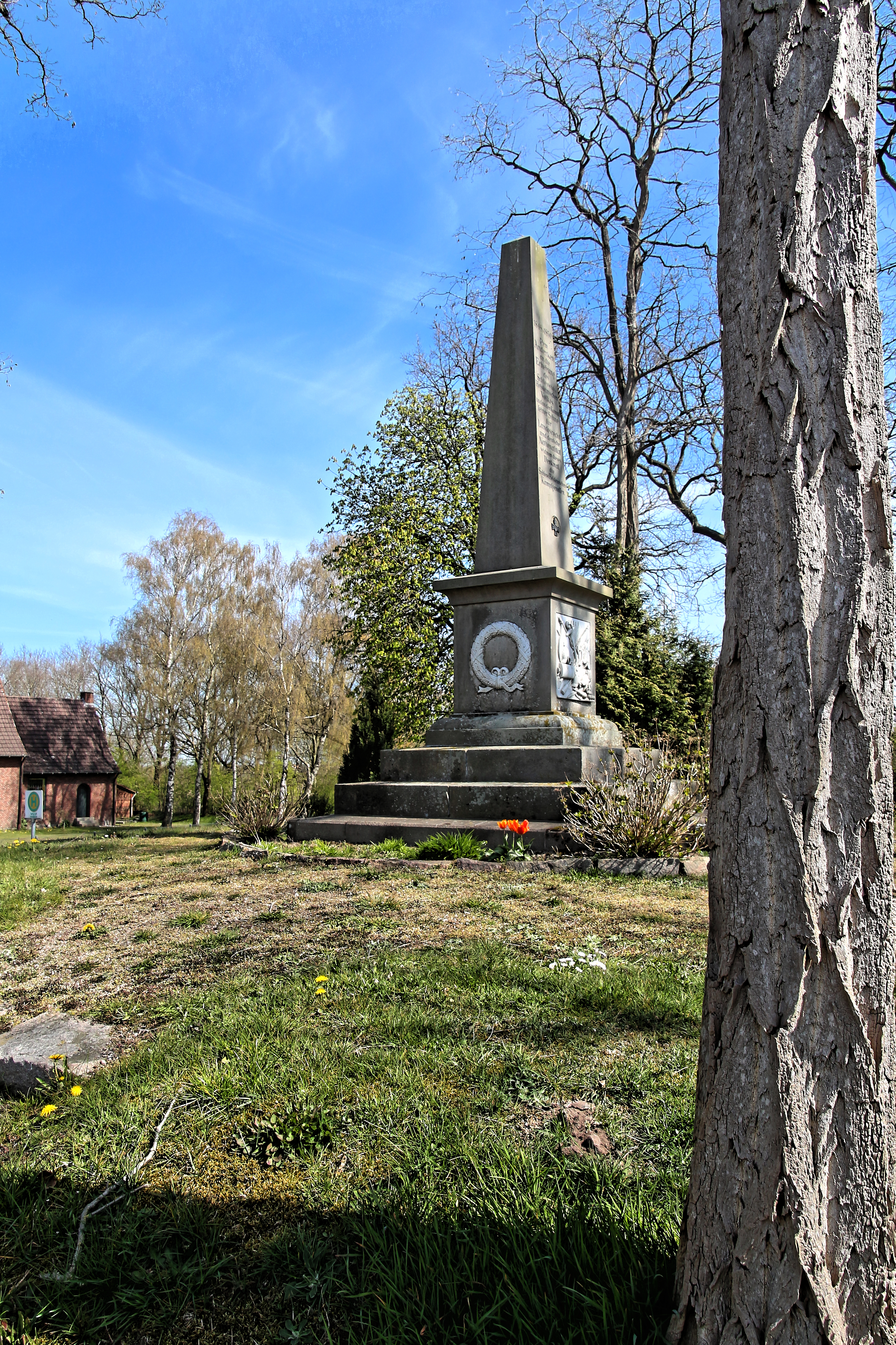 Idstedt, Ehrenmal